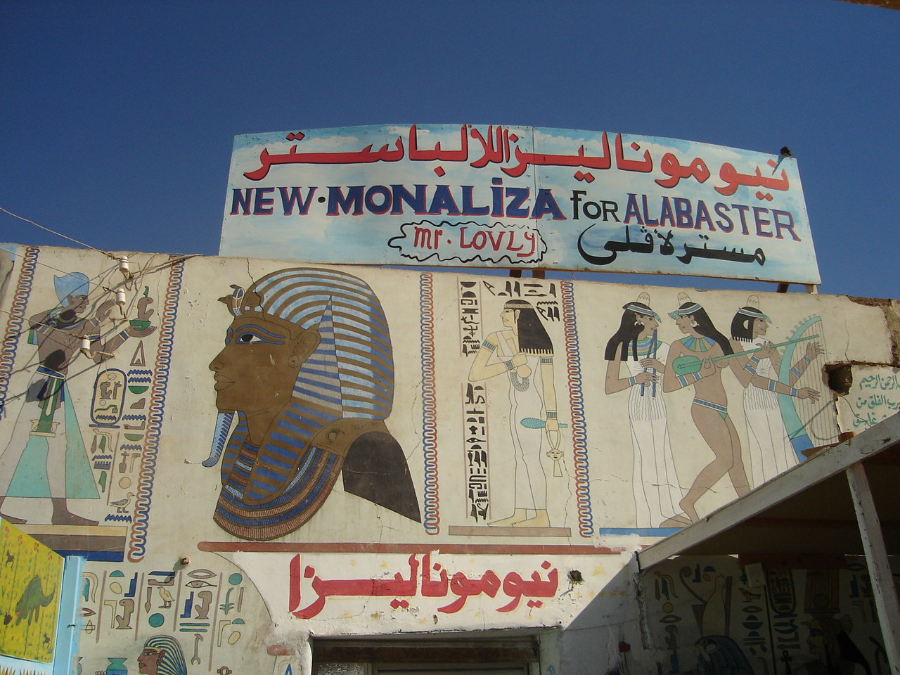 Immagine dall'Egitto - folklore/tourism in Egypt